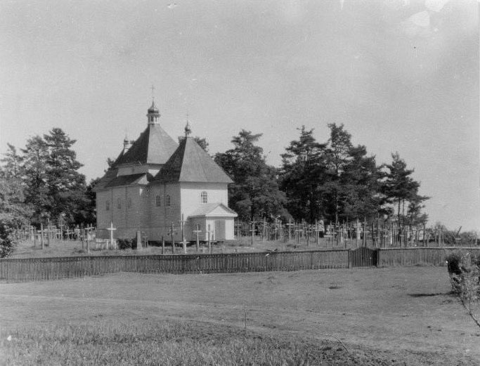 Беларуская (тарашкевіца): Давыд-Гарадок (Davyd-Haradok), вуліца Альшанская (vulica Alšanskaja). Царква Сьвятога Юрыя